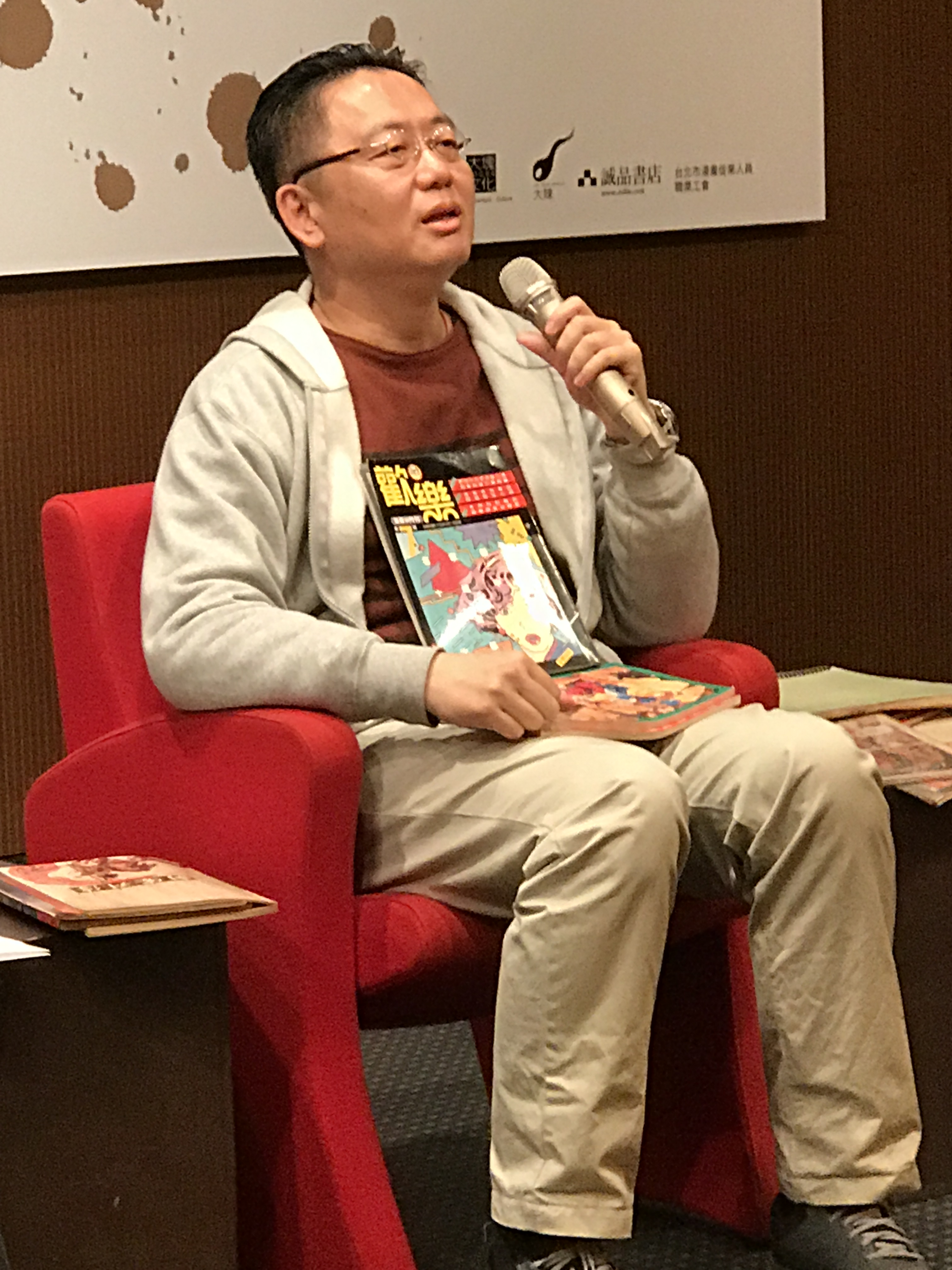 鄭問追思座談會中發言的傑利小子，手持本人畫封面的歡樂漫畫半月刊第8期。當時傑利小子的漫畫還沒開始連載，封面便已先上雜誌。